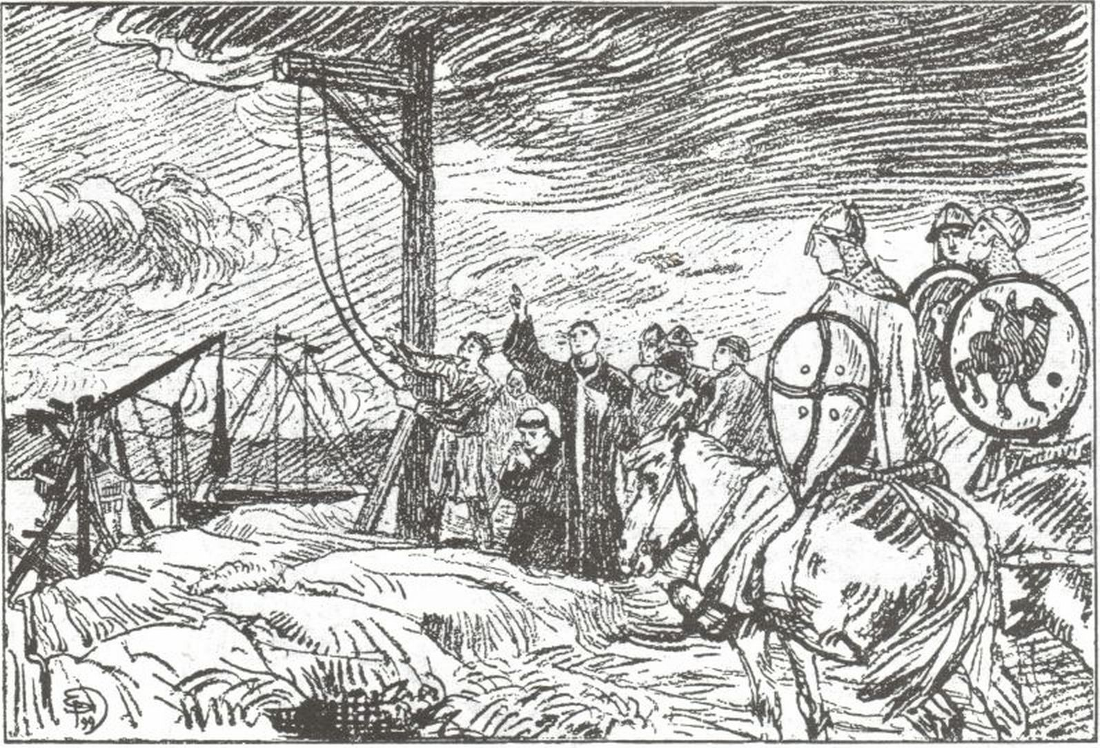 Eilif Peterssen: Illustration for Magnus Blindes og Harald Gilles saga, Heimskringla 1899-edition. nn: «Bisp Reinald vert hengd på Holmen ved valslyngja.»